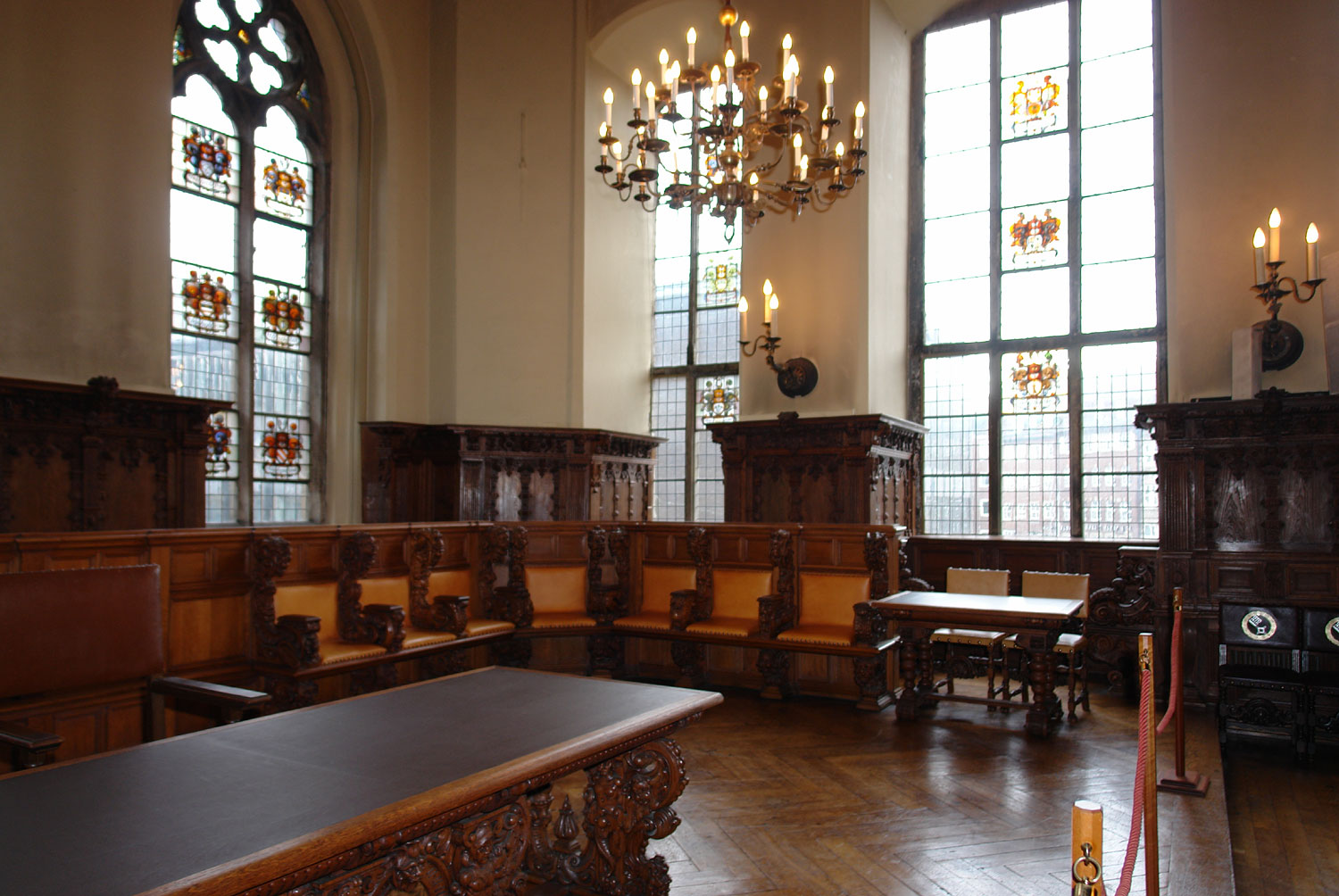 Rathaus in Bremen. Ratsgestühl in der Oberen Halle.